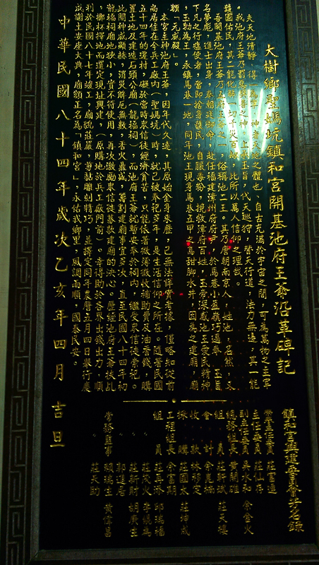 大樹區姑山里鎮和宮沿革碑記